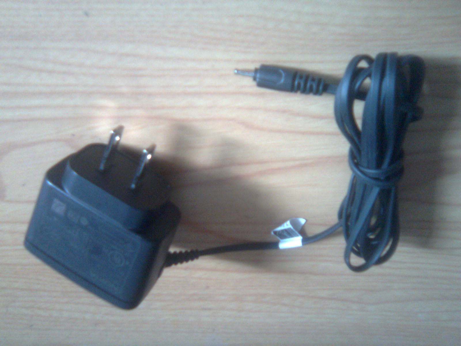 Cargador para telefono celular nokia5220Cargador Nokia